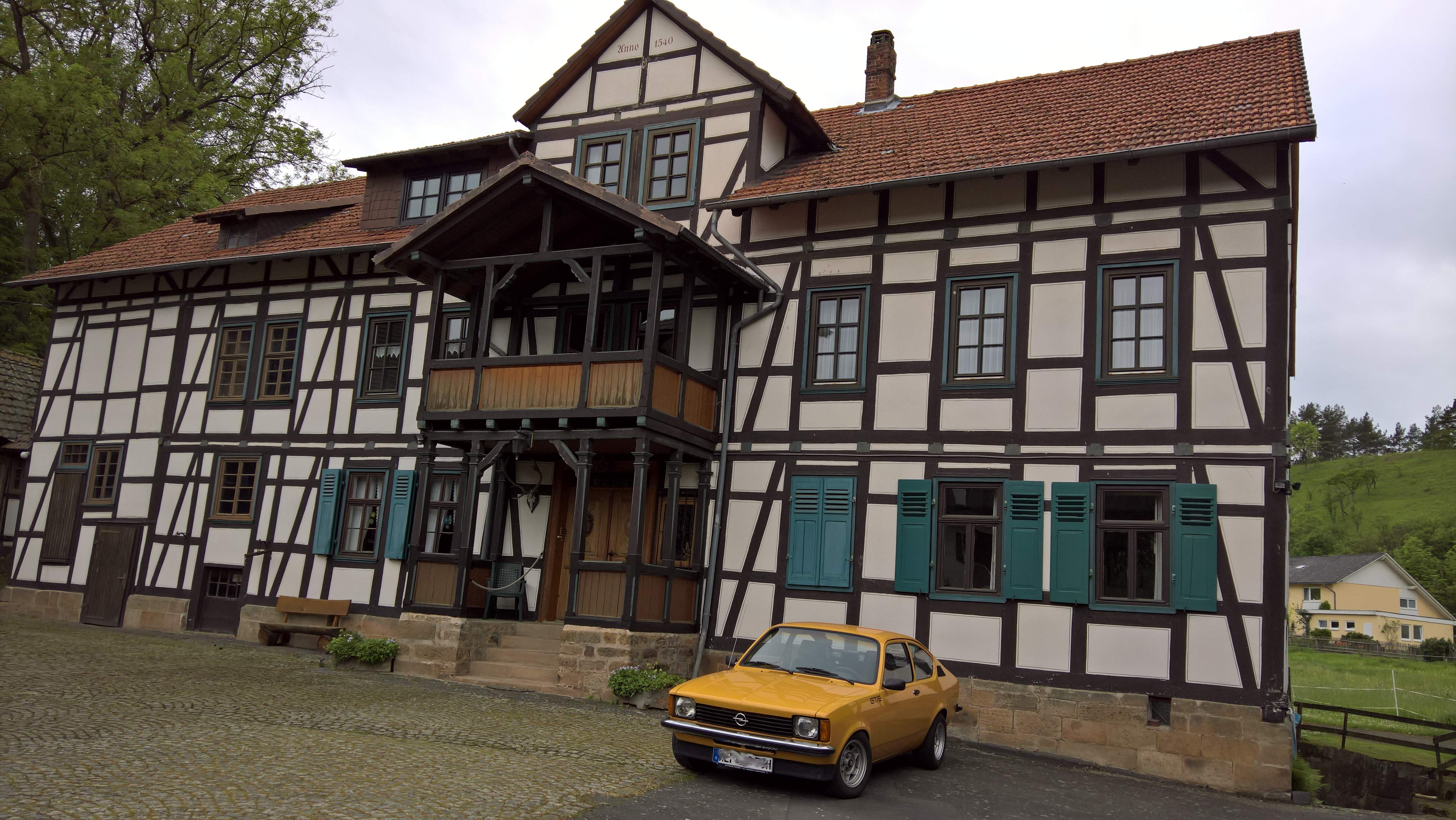 Die Obermühle heute (Frontansicht)